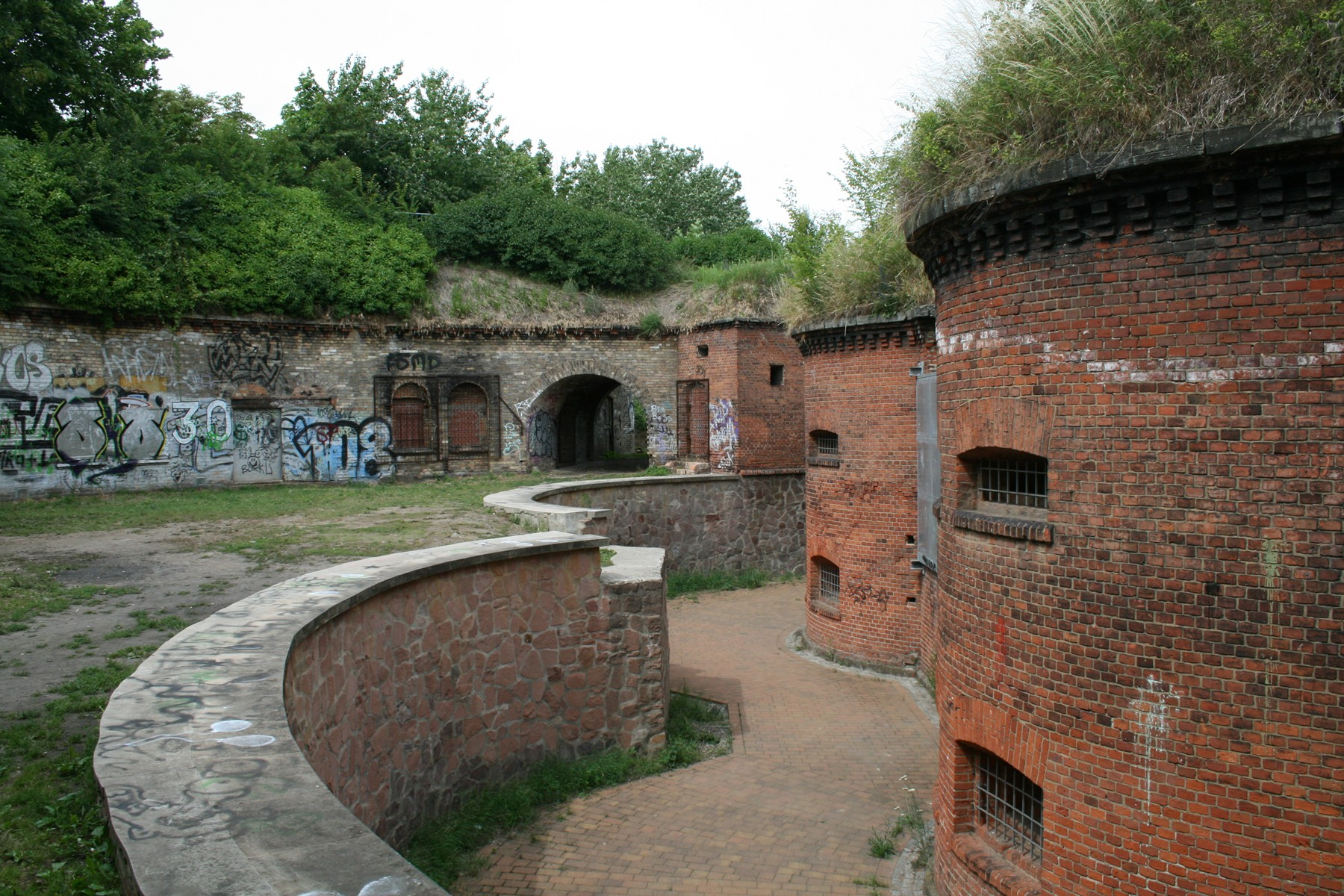 Magdeburg Ravelin 2